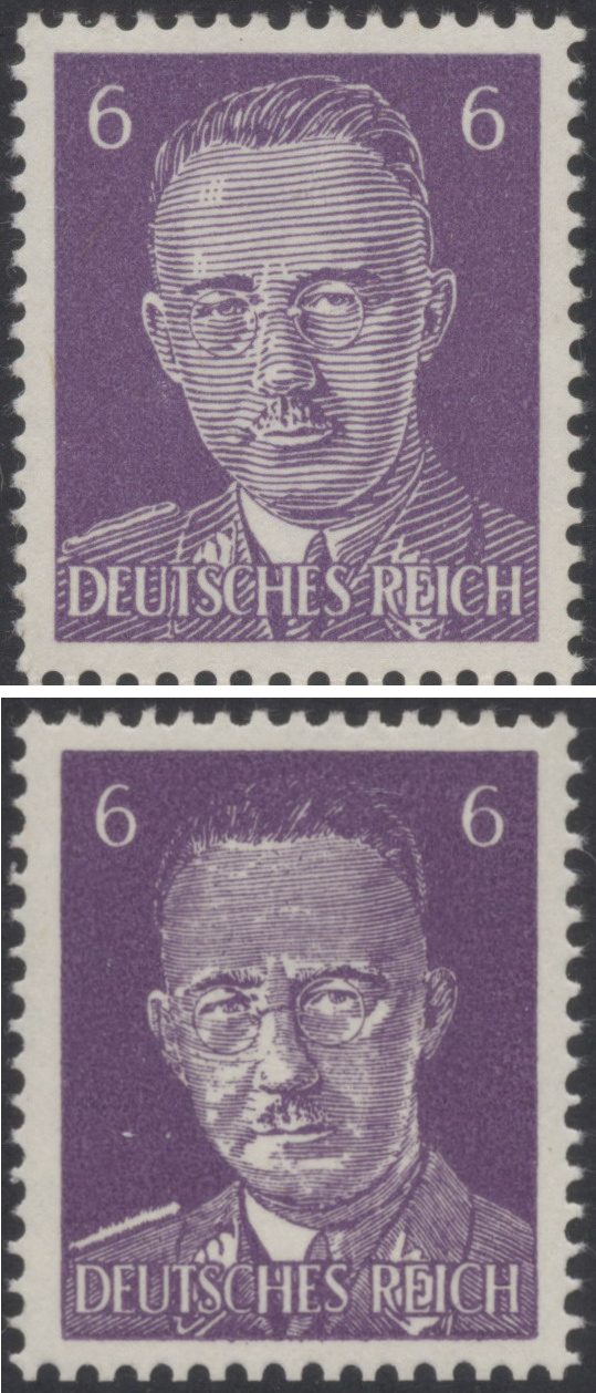 Britische Propagandafälschung für Deutschland. Anstelle des Kopfes von Hitler wurde der von Himmler eingesetzt. Existiert in 2 Versionen: Weite Linien (oben) und enge Linien (unten)